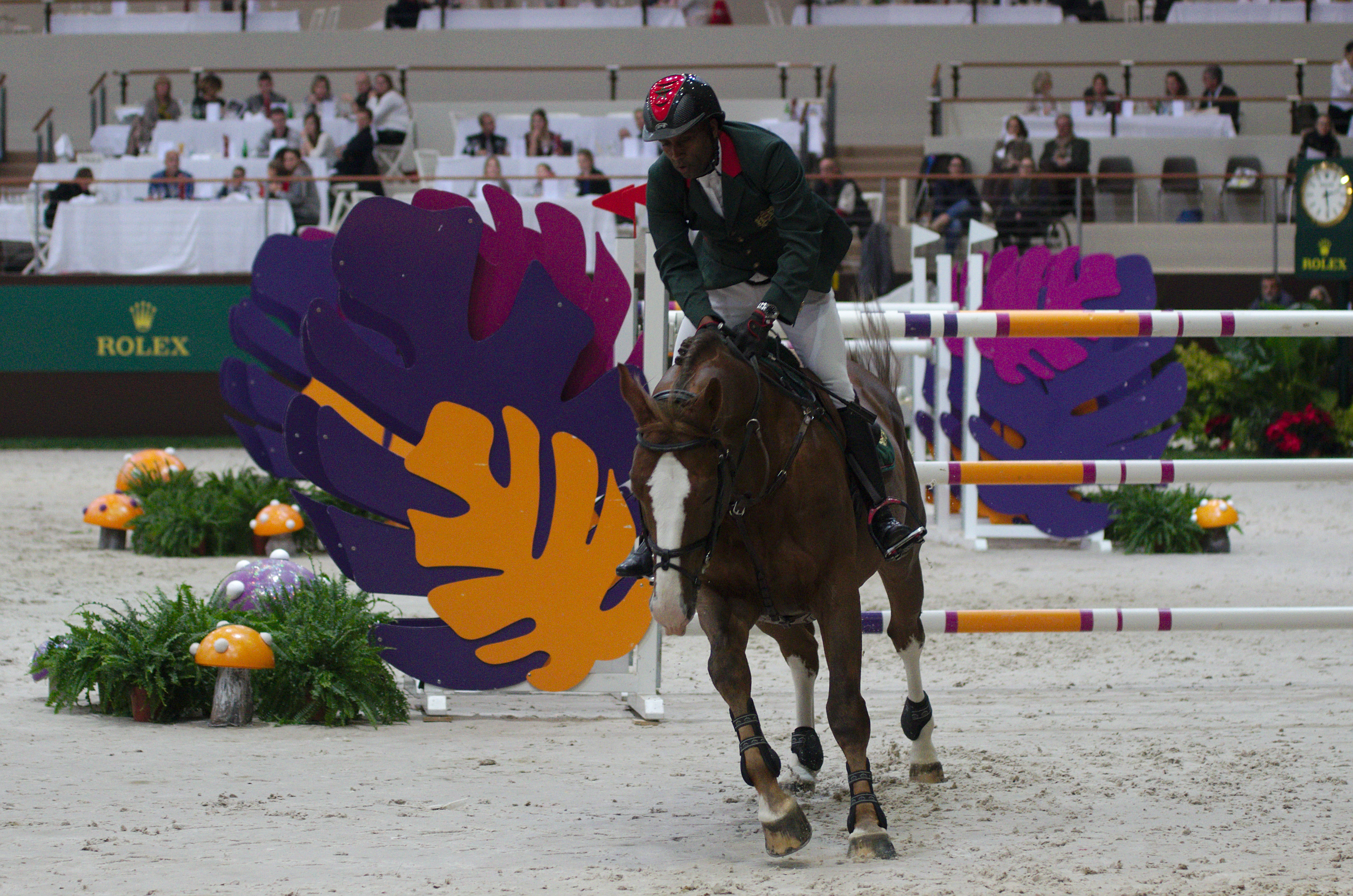 54eme CHI de Genève - 20141213 - Coupe de Genève - Abdelkebir Ouaddar et Quebec Tame